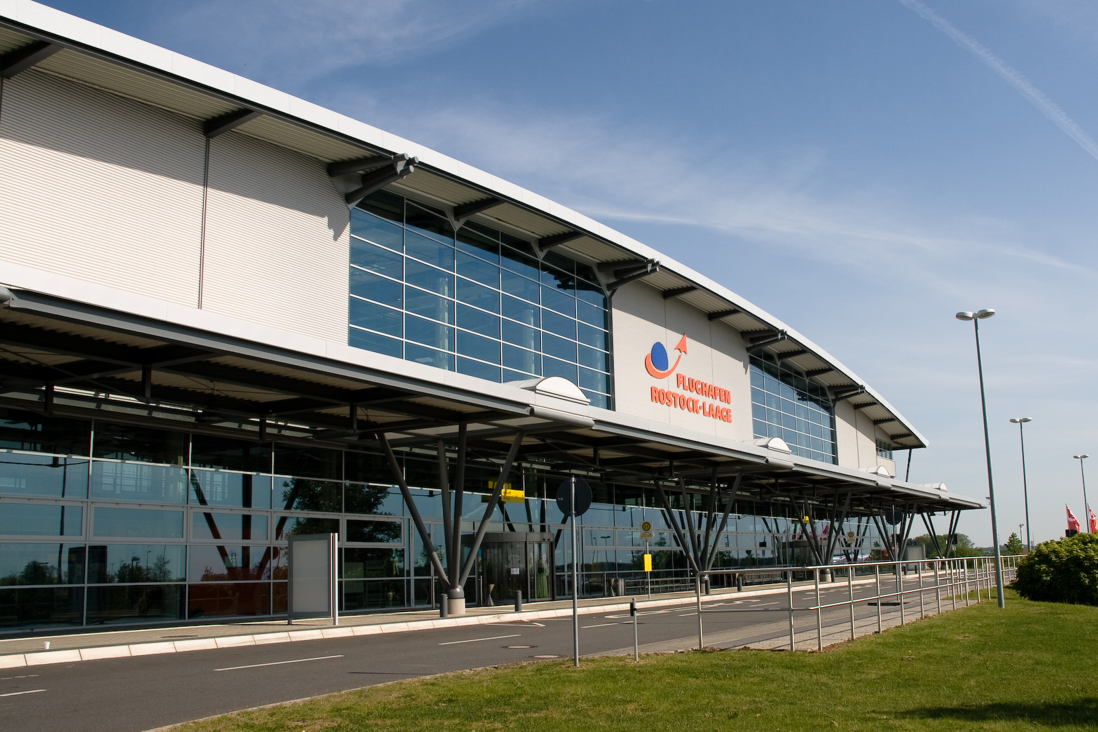 Eingang in das Flughafengebäude